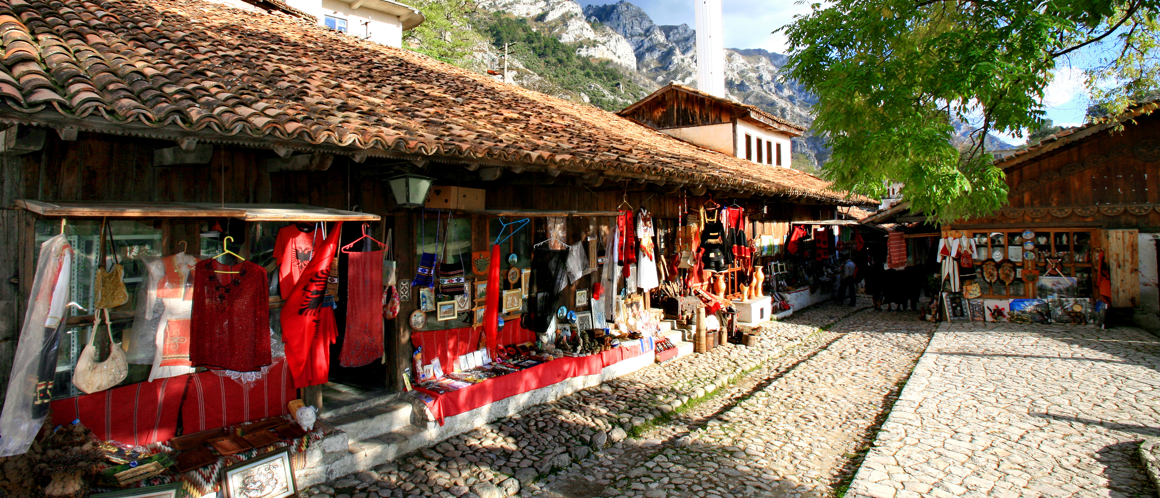 Pazari i vjetër i Krujës